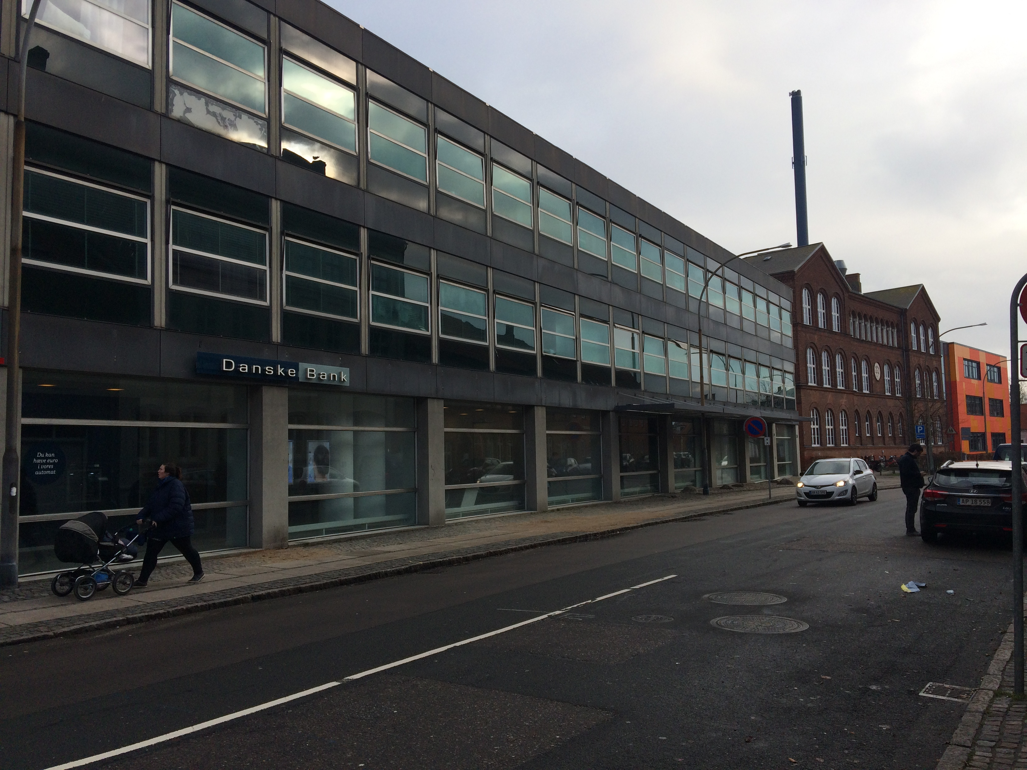 Søfartsstyrelsens hoveddomicil, Caspar Brands Plads 9, 4220 Korsør